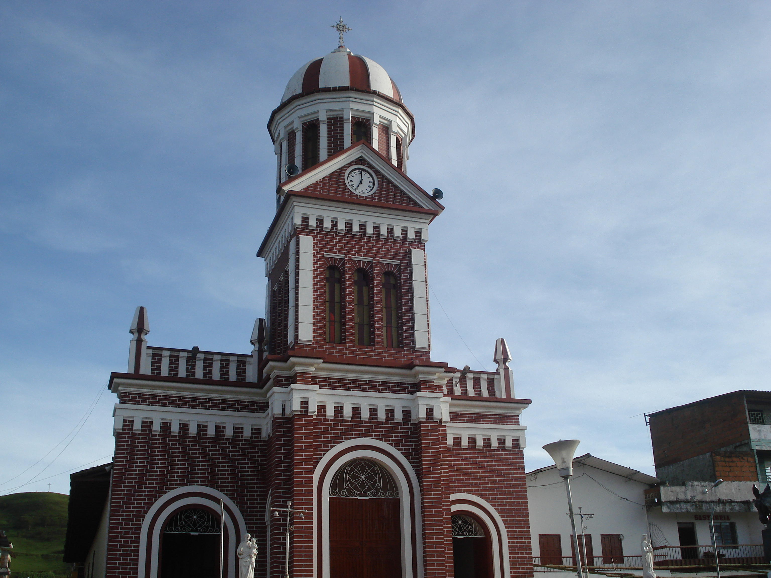 Fachada de la Iglesia de Nuestra Señora del Rosario, Campamento, Colombia.